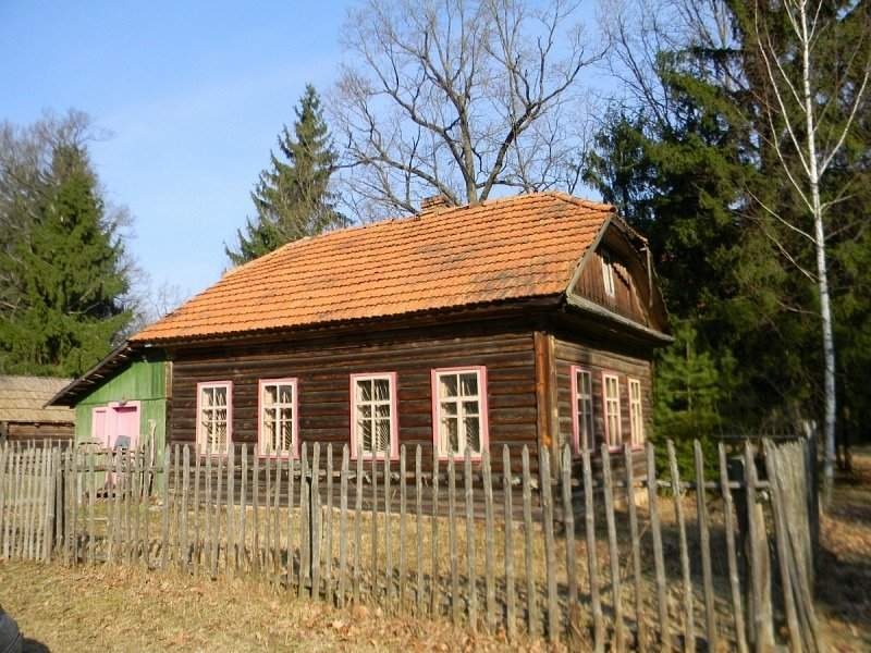 Глуша. Музей рамёстваў